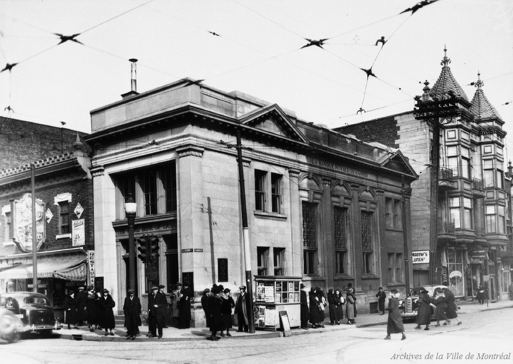 Photographie d'une succursale de la Banque Royale du Canada (1100, rue Sainte-Catherine Est, à l'angle de la rue Amherst). On y aperçoit un kiosque à journaux, les restaurants Electra Ice Crem Parlor (rue Sainte-Catherine) et Manny's Lunch (rue Amherst).